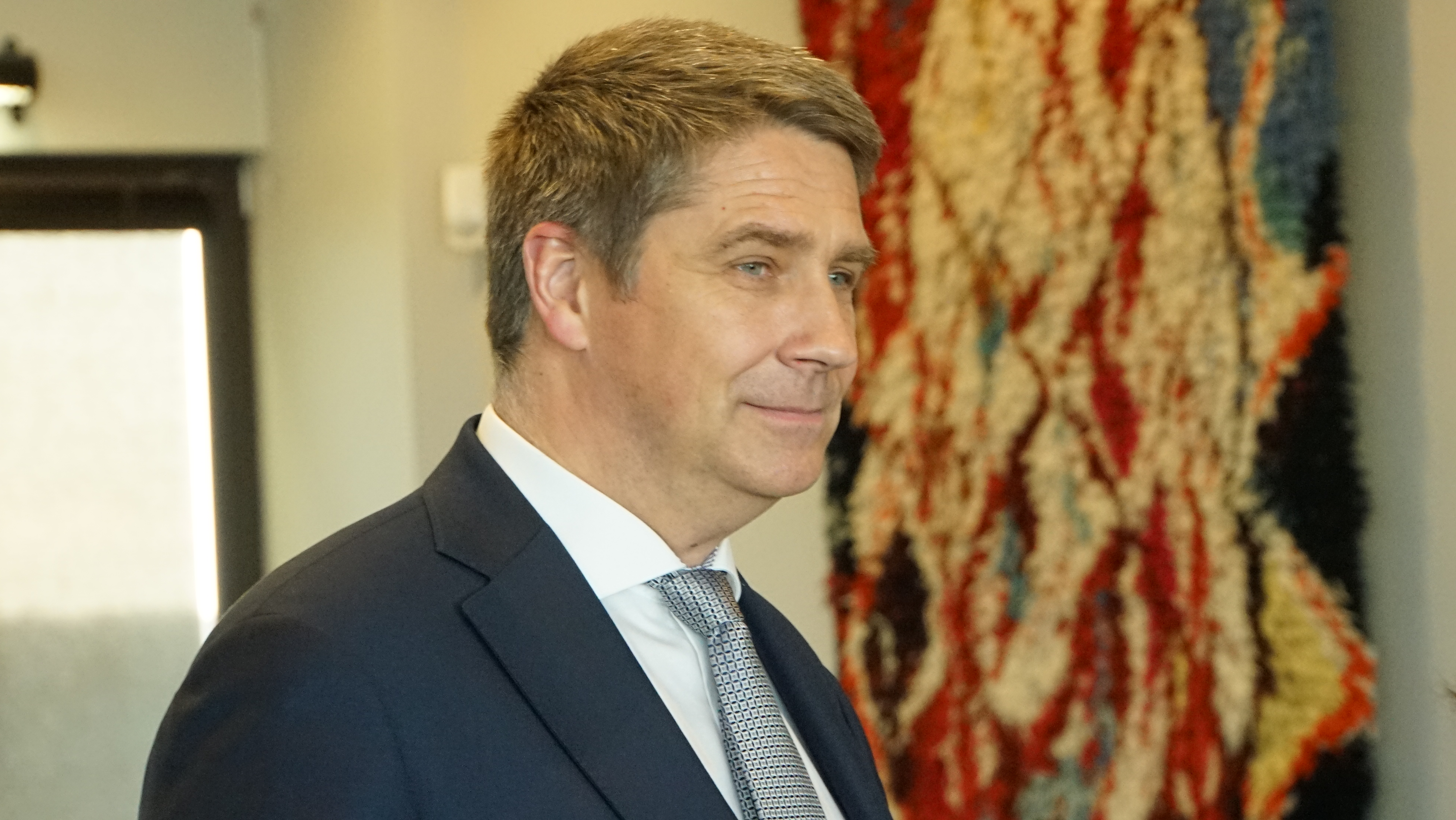 Märt Volmer, välisministeeriumi Euroopa küsimuste asekantsler